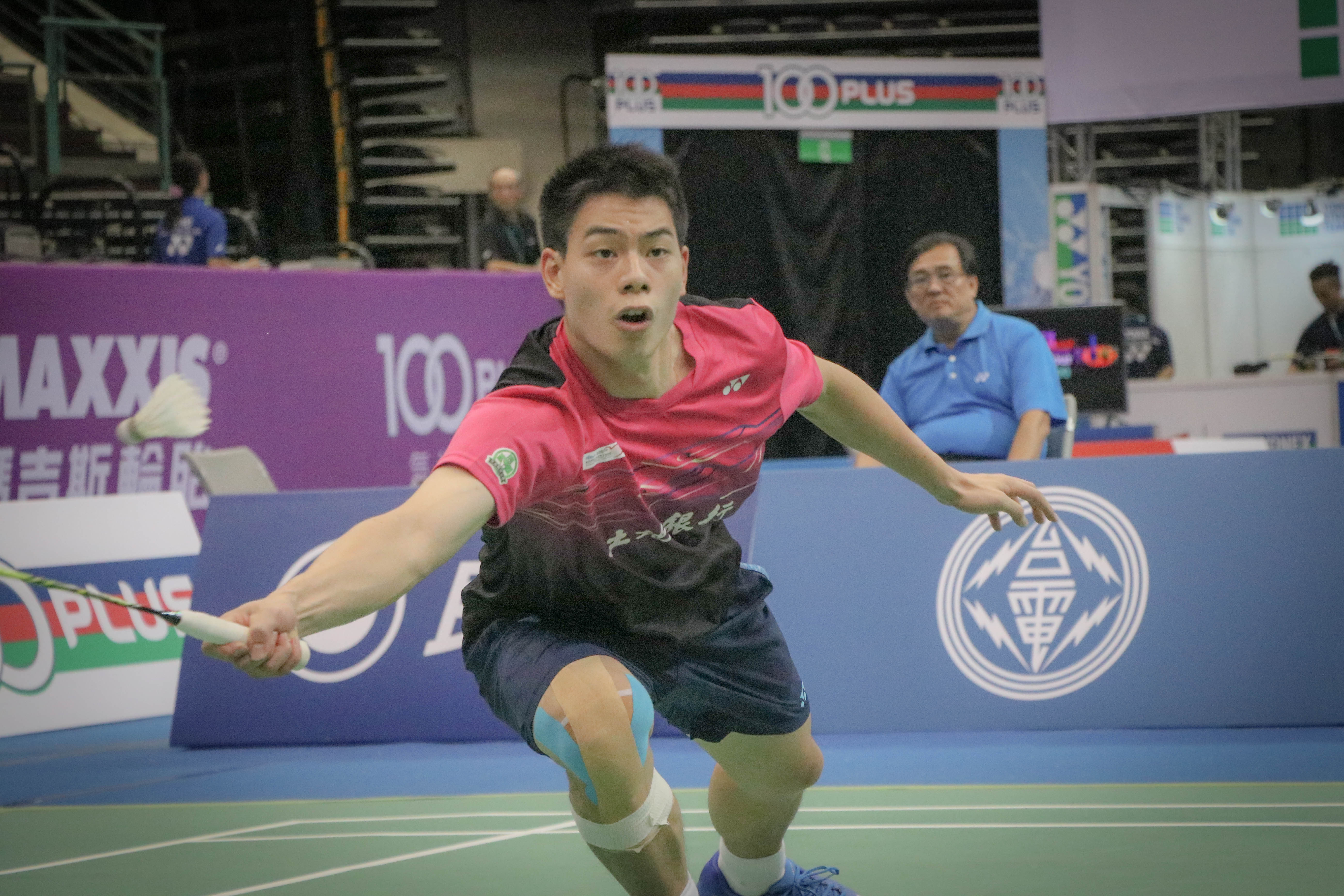 2018 台北OPEN 10/03